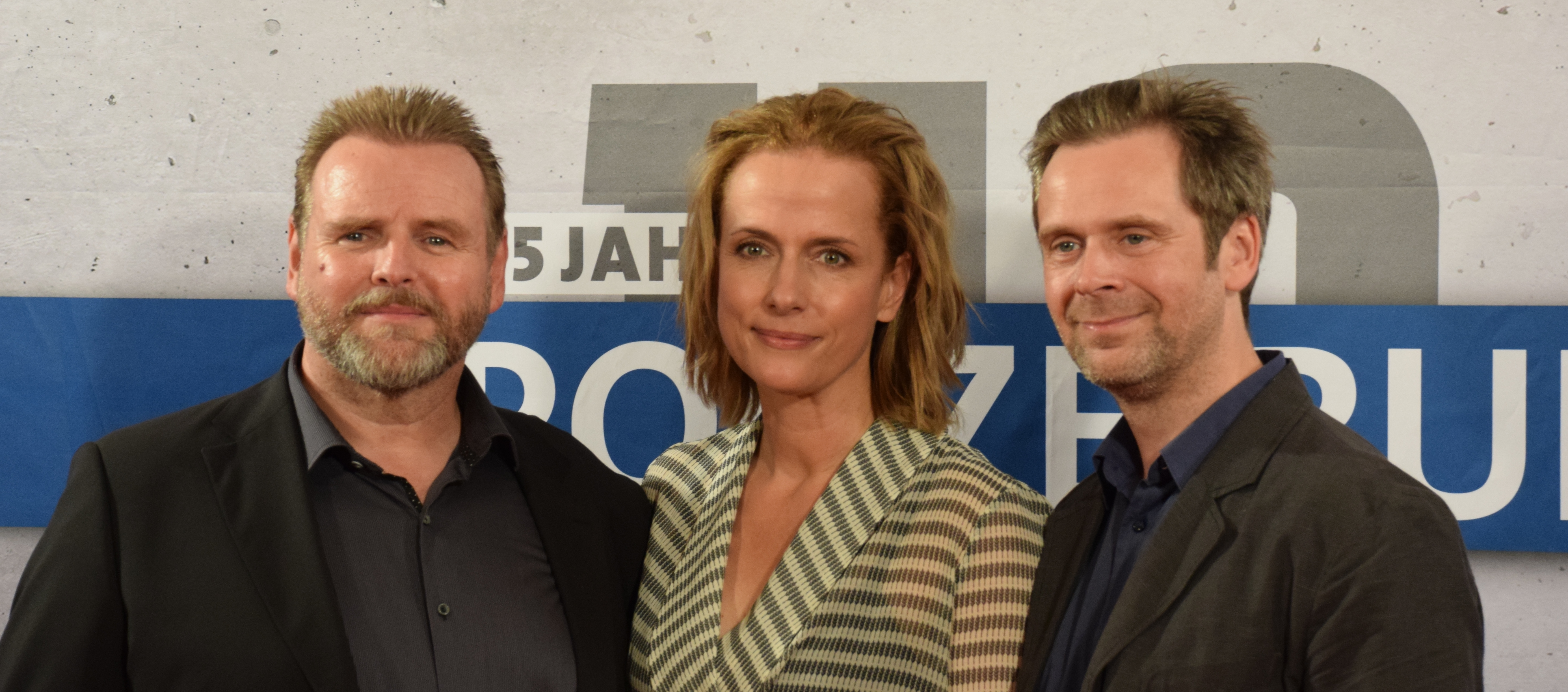 Team des Magdeburger Polizeiruf 110 (von links nach rechts): Felix Vörtler (Kriminalrat Uwe Lemp; Polizeiruf 110, Magdeburg), Claudia Michelsen (Kriminalhauptkommissarin Doreen Brasch; Polizeiruf 110, Magdeburg) und Matthias Matschke (Kriminalhauptkommissar Dirk Köhler; Polizeiruf 110, Magdeburg); Preview zum Jubiläums-Polizeiruf-110 (45 Jahre Polizeiruf 110) „Endstation“